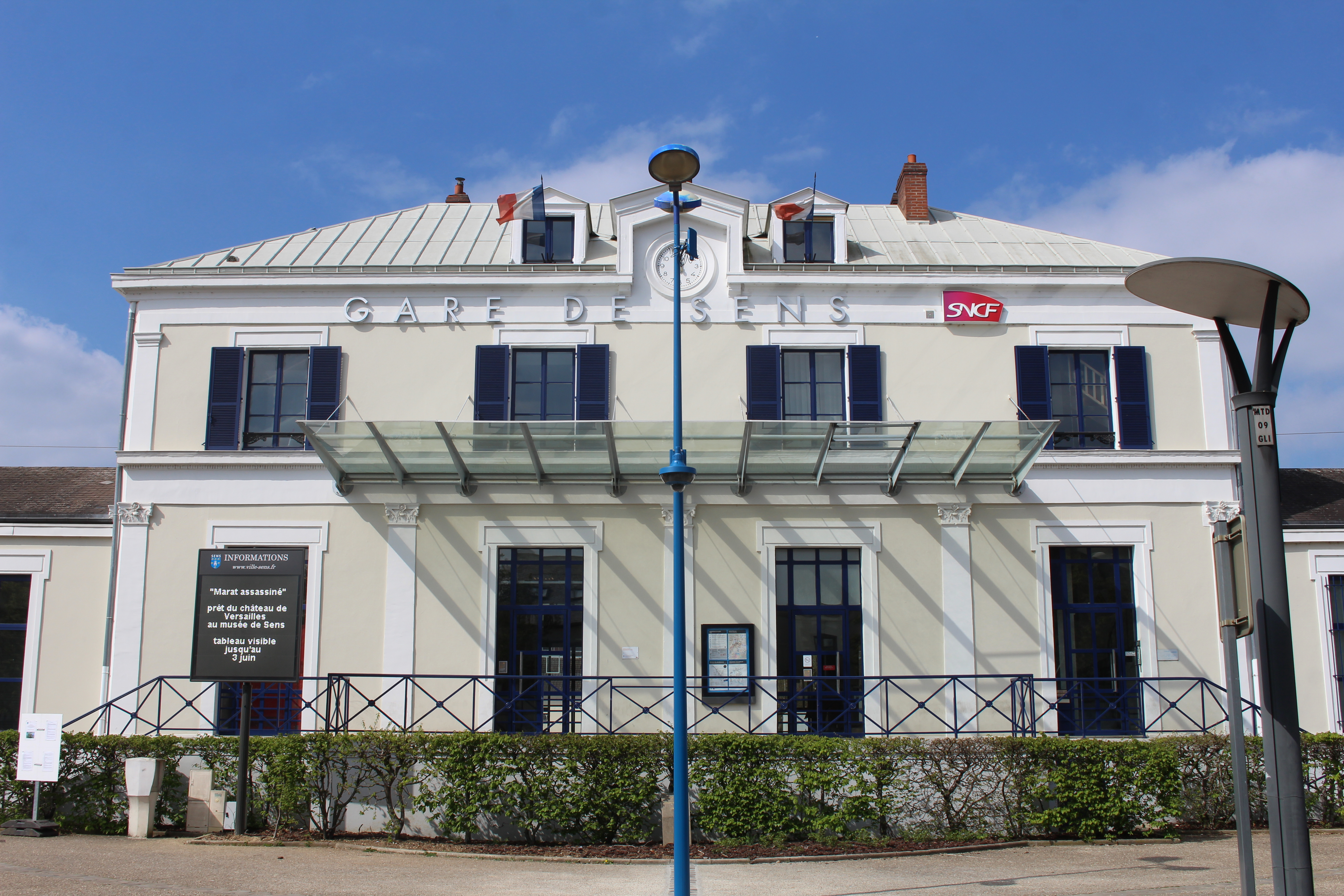 Gare de Sens.